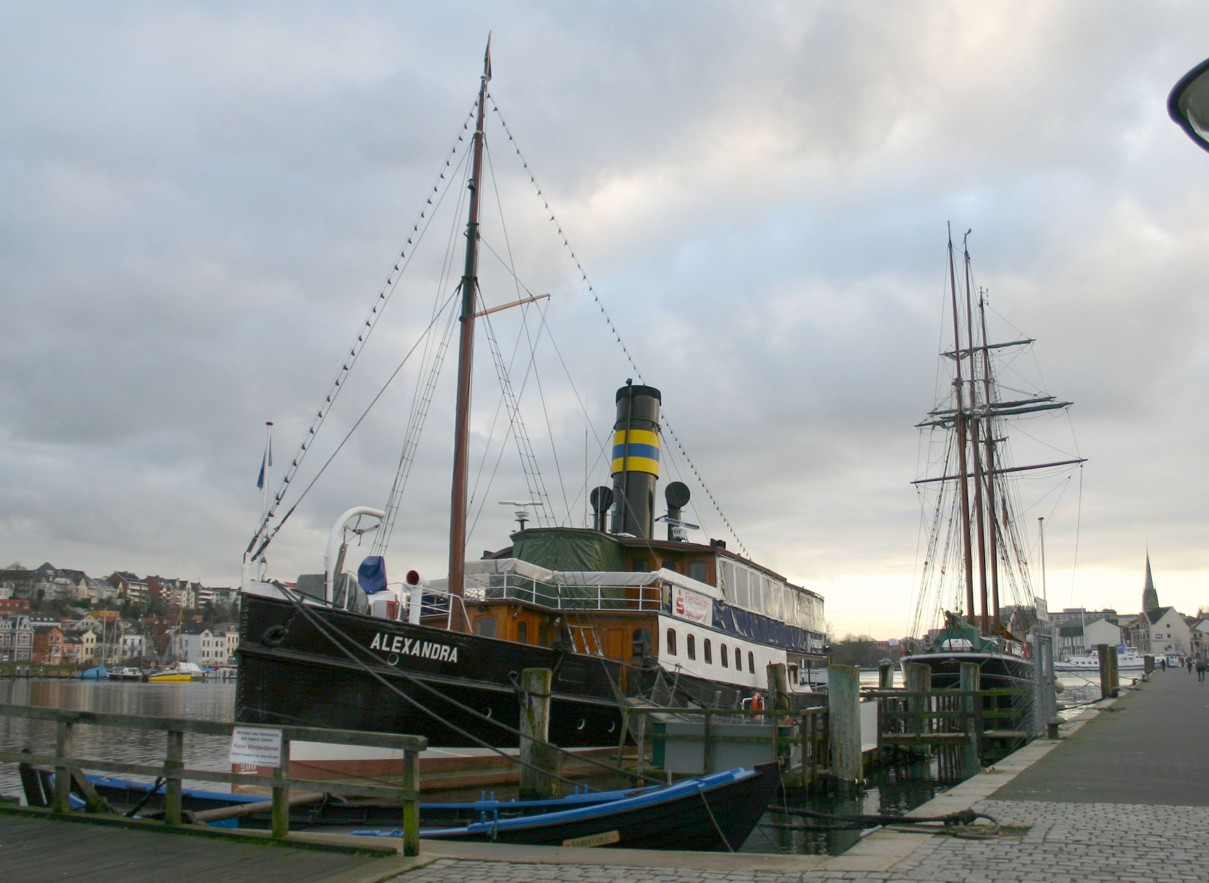 Museumsschiff Alexandra in Flensburg